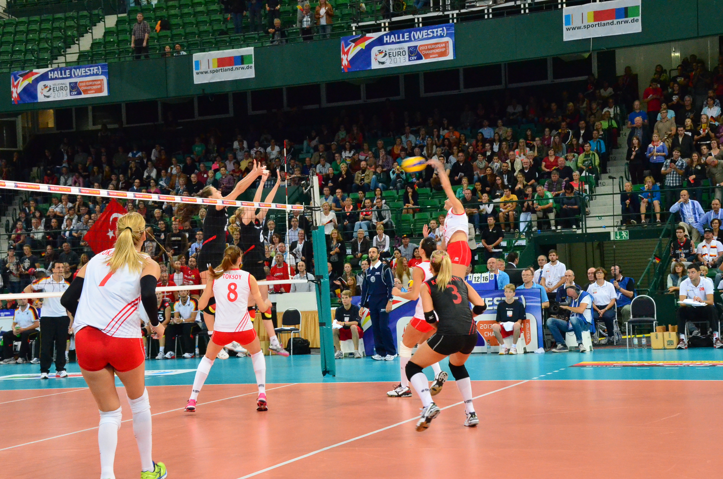 Volleyball-Europameisterschaft der Frauen 2013-Spielort Halle (Westf) Gerry-Weber-Stadion - Spiel 8. September 2013 (Deutschland-Türkei)